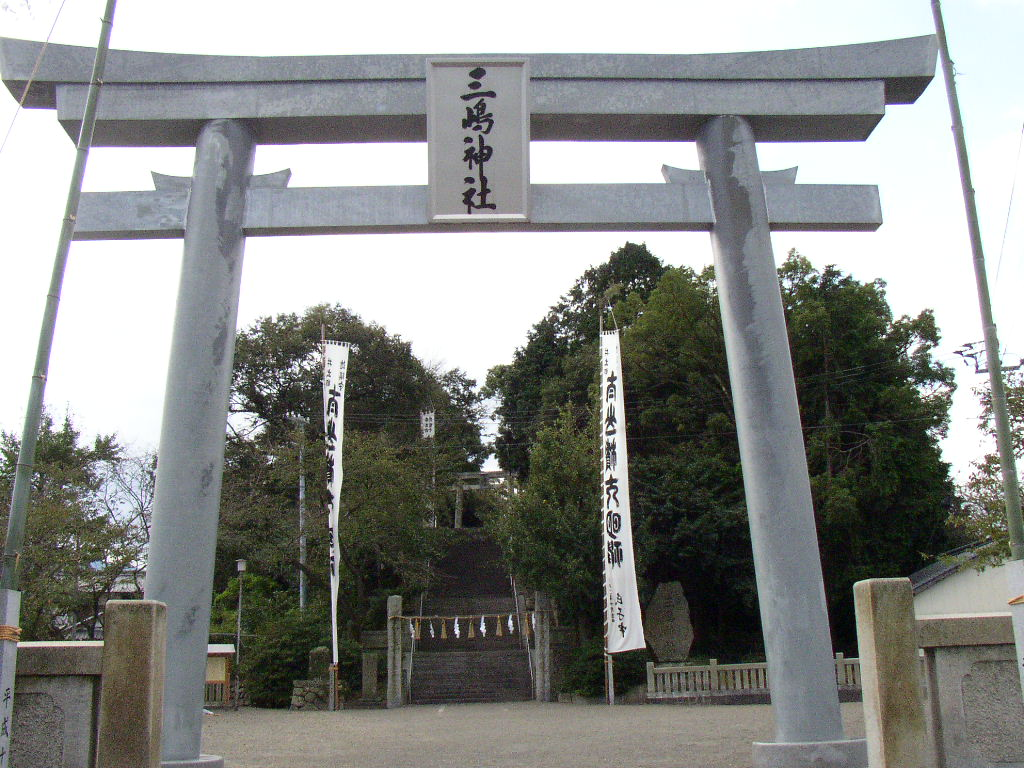 愛媛県西条市小松町の小松祭り(三嶋神社例大祭)の氏神さん